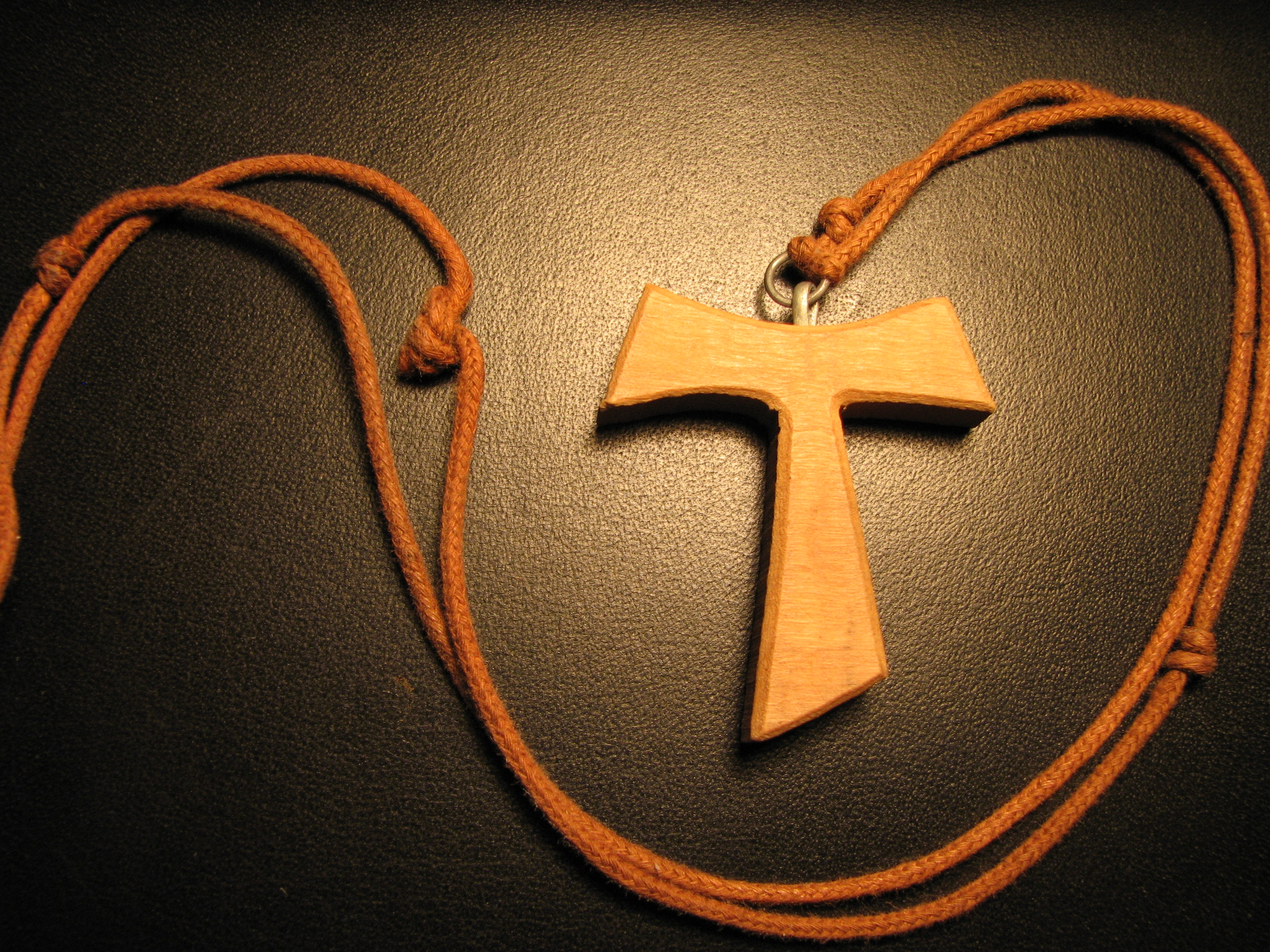 Franciscan Tau